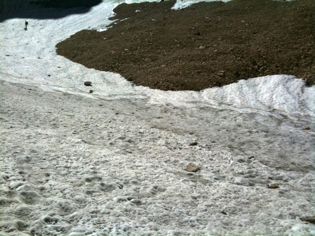 ghiacciaio del calderone, 11 Settembre 2011